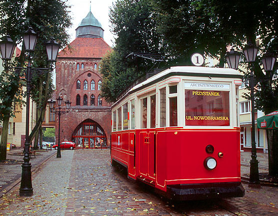 Kaszëbsczi: Stôrodôwny elektrisz na Stôrim Gardze